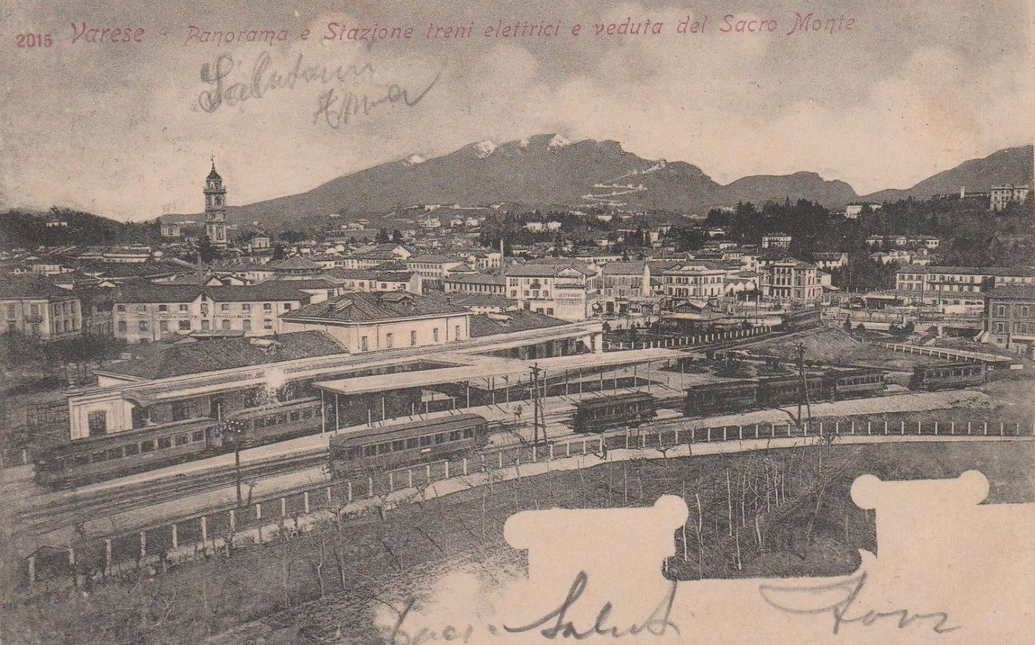 Cartolina viaggiata "VARESE PANORAMA E STAZIONE TRENI ELETTRICI E VEDUTE DEL SACRO MONTE": vista panoramica su Varese (con in primo piano la stazione FS) nella prima metà del XX secolo